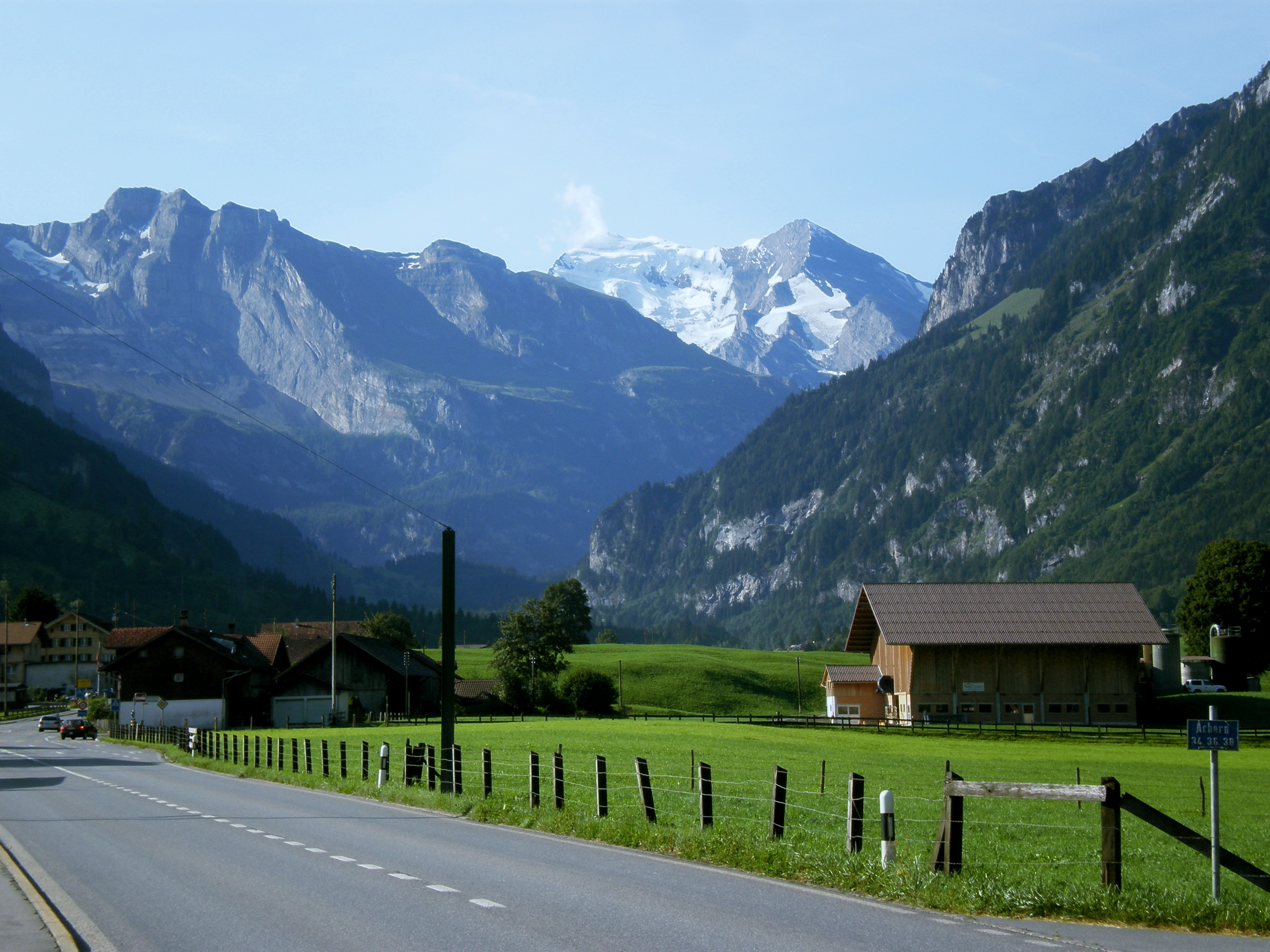 Frutigen, un pueblu Suiça